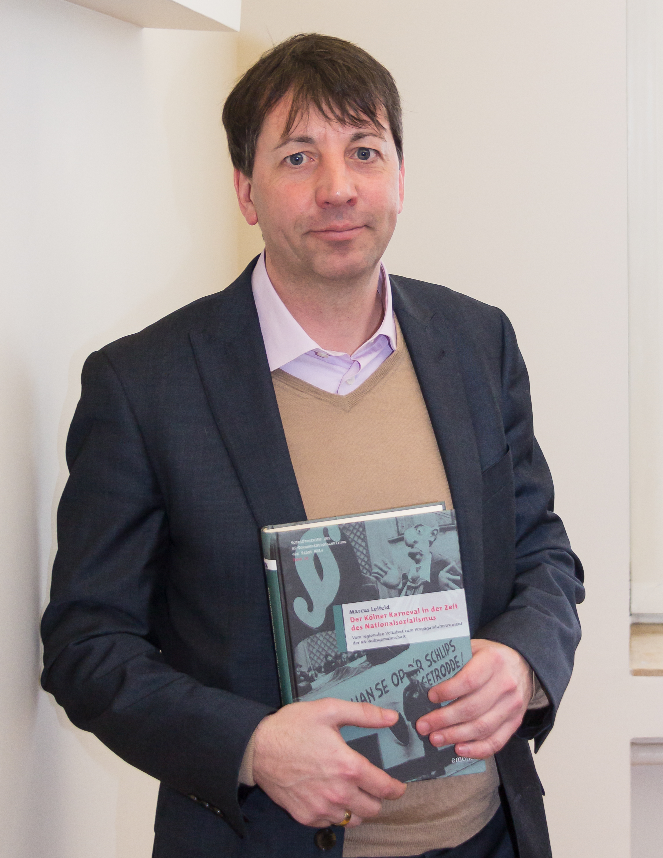 Marcus Leifeld, Buchpräsentation im EL-DE-Haus Köln. „Der Kölner Karneval in der Zeit des Nationalsozialismus. Vom regionalen Volksfest zum Propagandainstrument der NS-Volksgemeinschaft“ (Schriftenreihe des NS-Dokumentationszentrums der Stadt Köln; Band 18), Emons Verlag Köln 2015